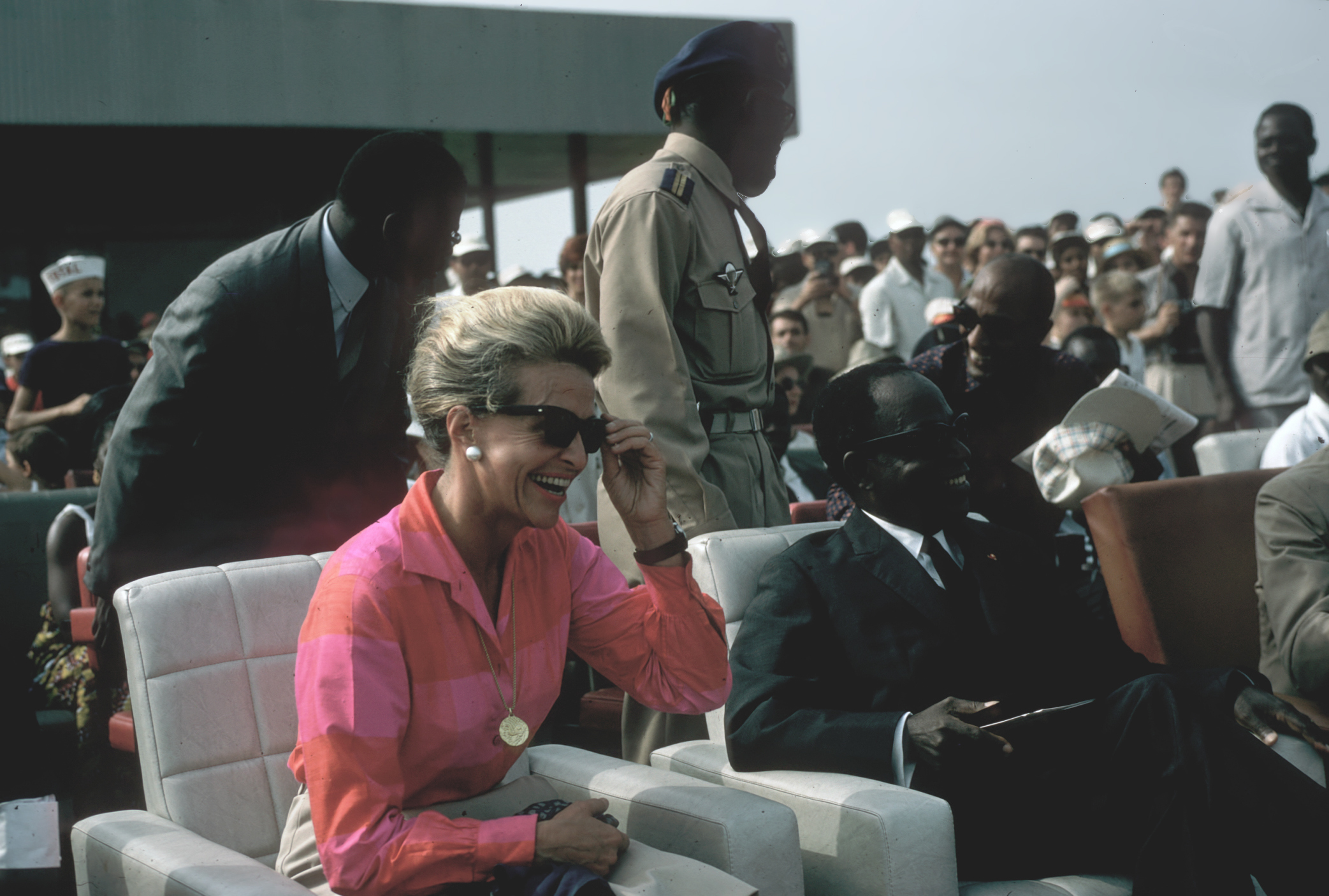 1966 05 05 cote d ivoire abidjan Houphouet Boigny et Jacqueline Auriol